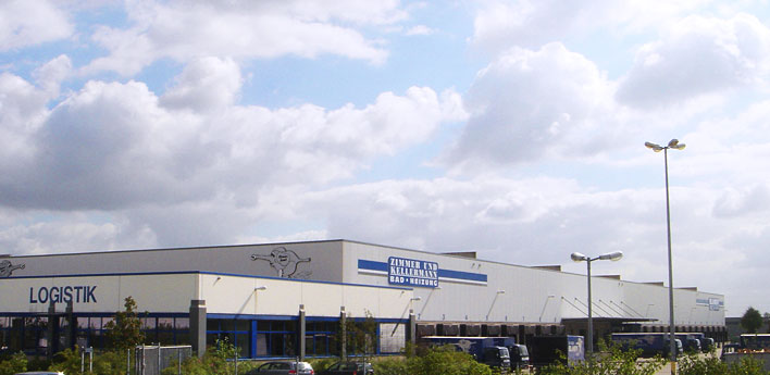 22.000qm großes Zentrallager der Elmer-Unternehmensgruppe in Dormagen.